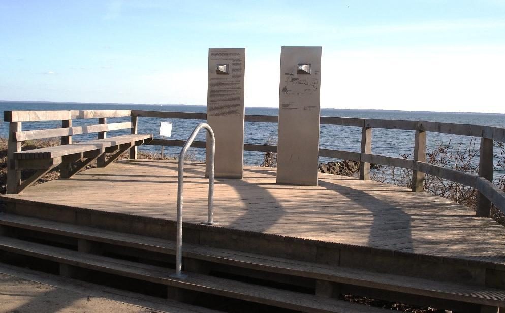 Ehrenfreidhof Cap Arcona - Informationsstelen